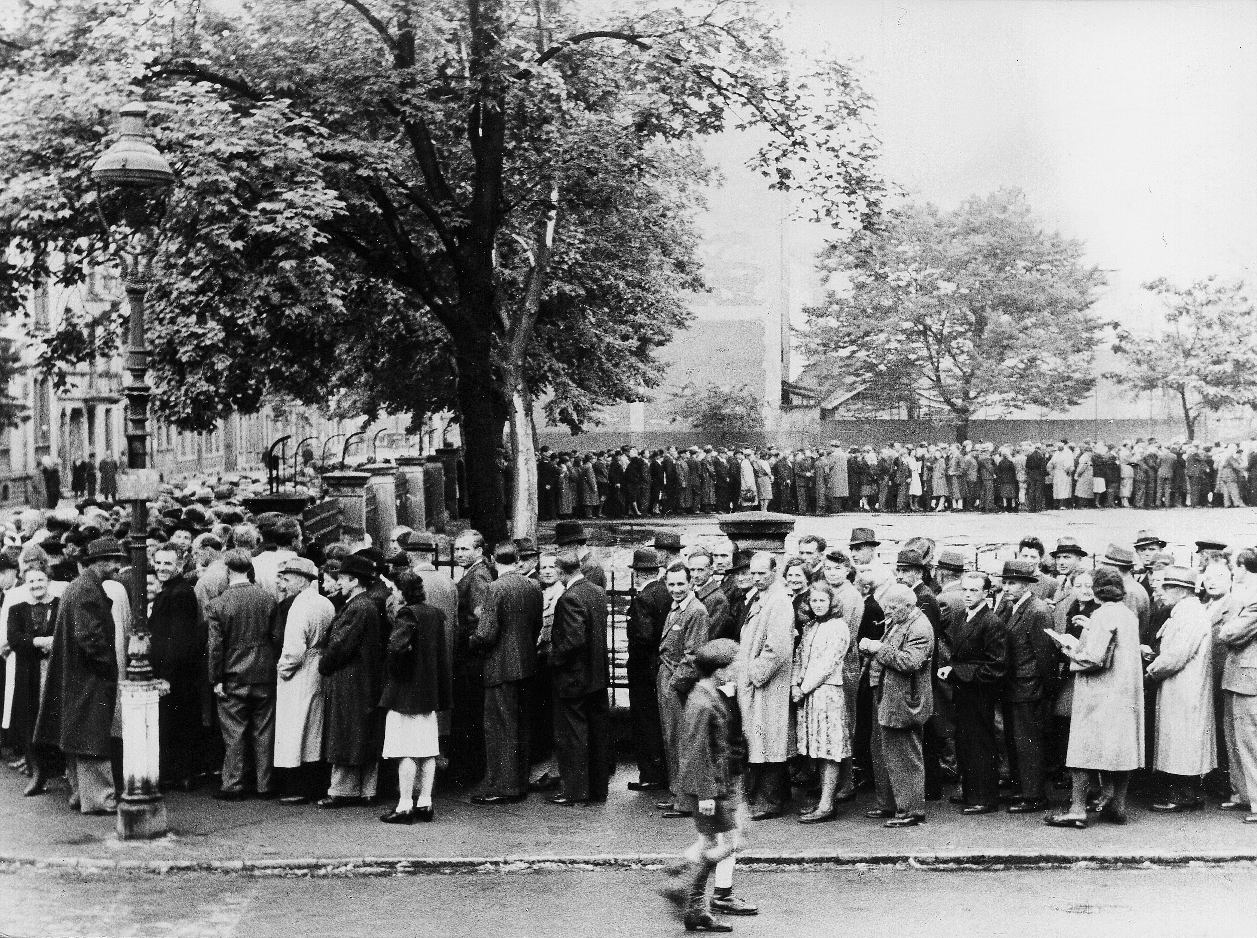 Menschen stehen in Frankfurt am Main (wie überall in den drei westlichen Besatzungszonen) am 20. Juni 1948 in einer fast endlos scheinenden Schlange vor den Geldumtauschbüros an. Datei zum Abdruck zur Verfügung gestellt durch Zeitgut Verlag Berlin, 2008 Foto BfH Bundesdienste für Heimatfragen Herausgegeben II/2/68 Abdruck honorarfrei